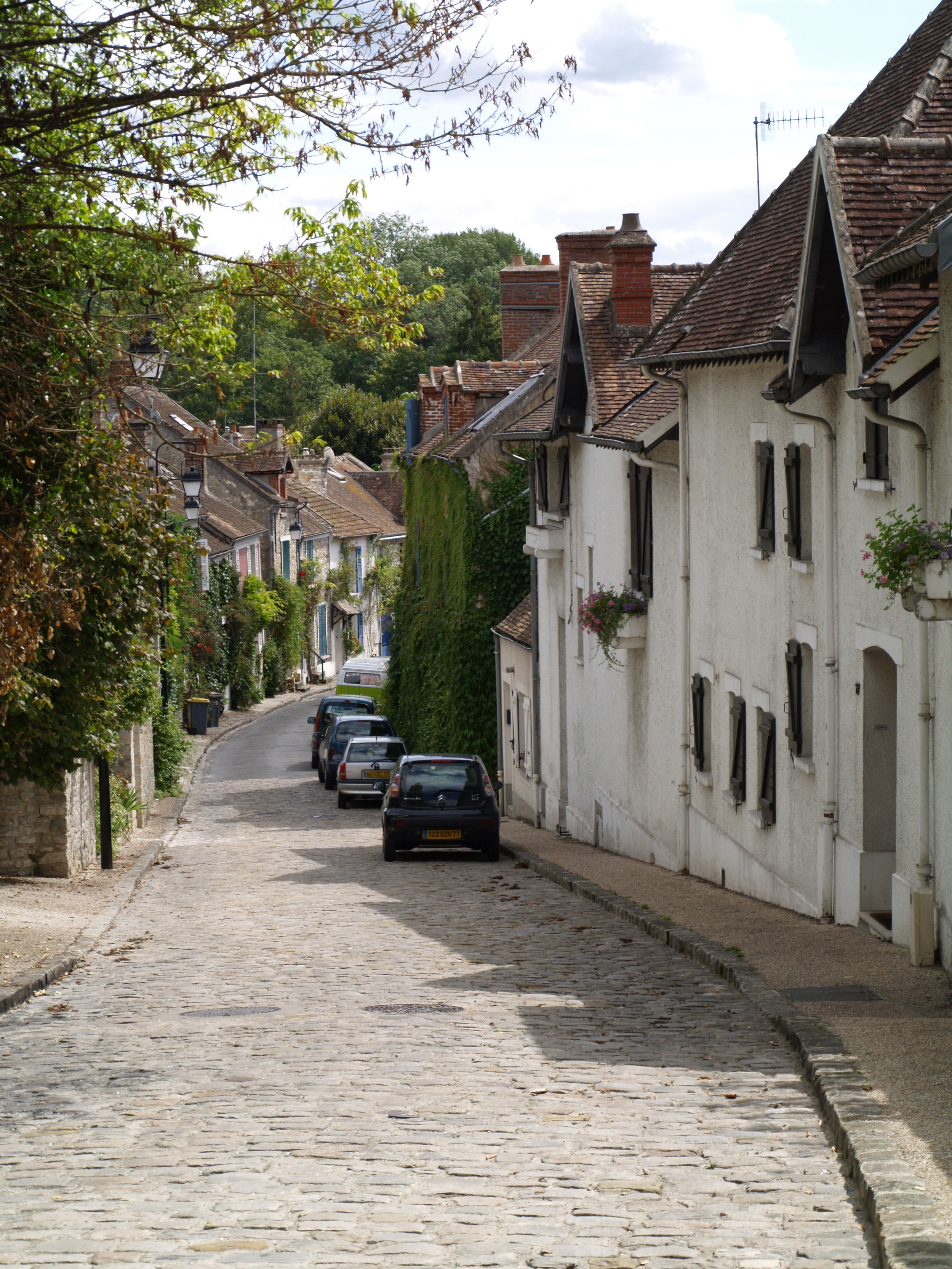 Samois-sur Seine, Seine-et-Marne, France. Une rue descendant vers la Seine